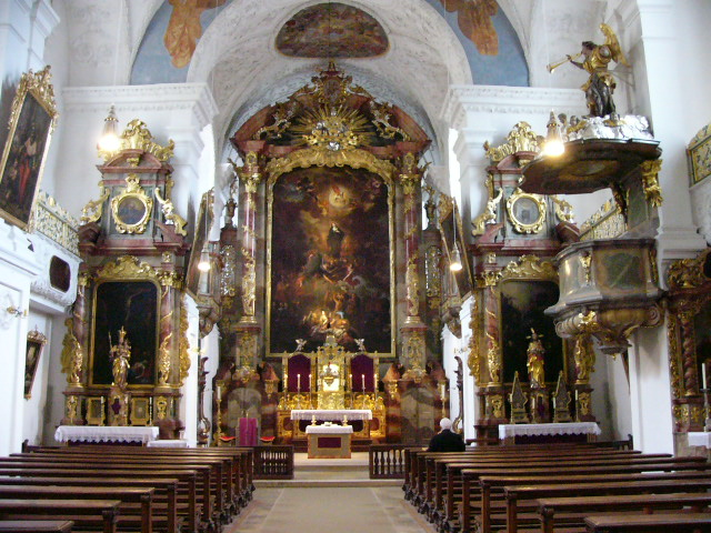 Innenraum der Klosterkirche St. Walburg in Eichstätt